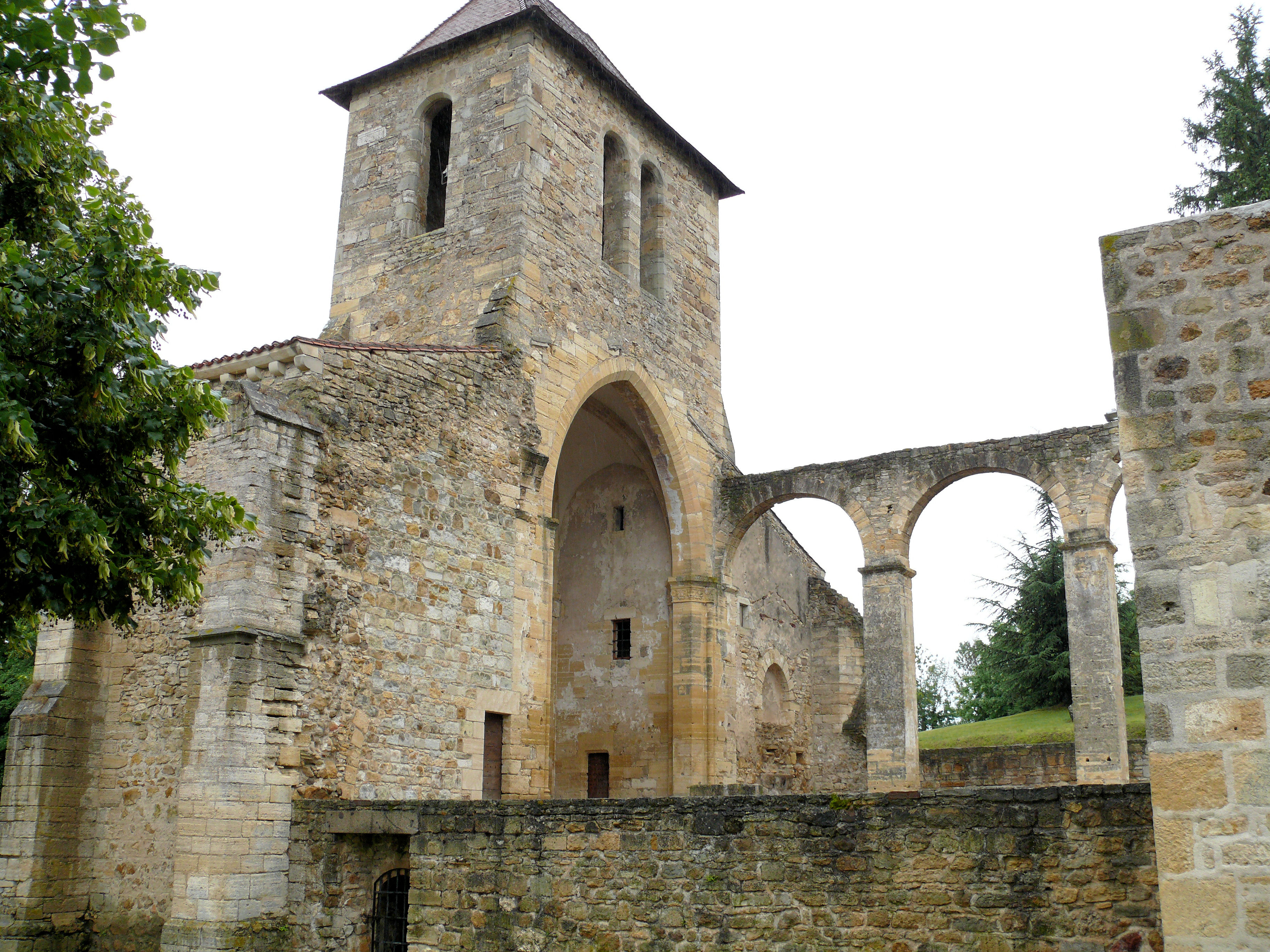 Vertaizon - Eglise Notre-Dame